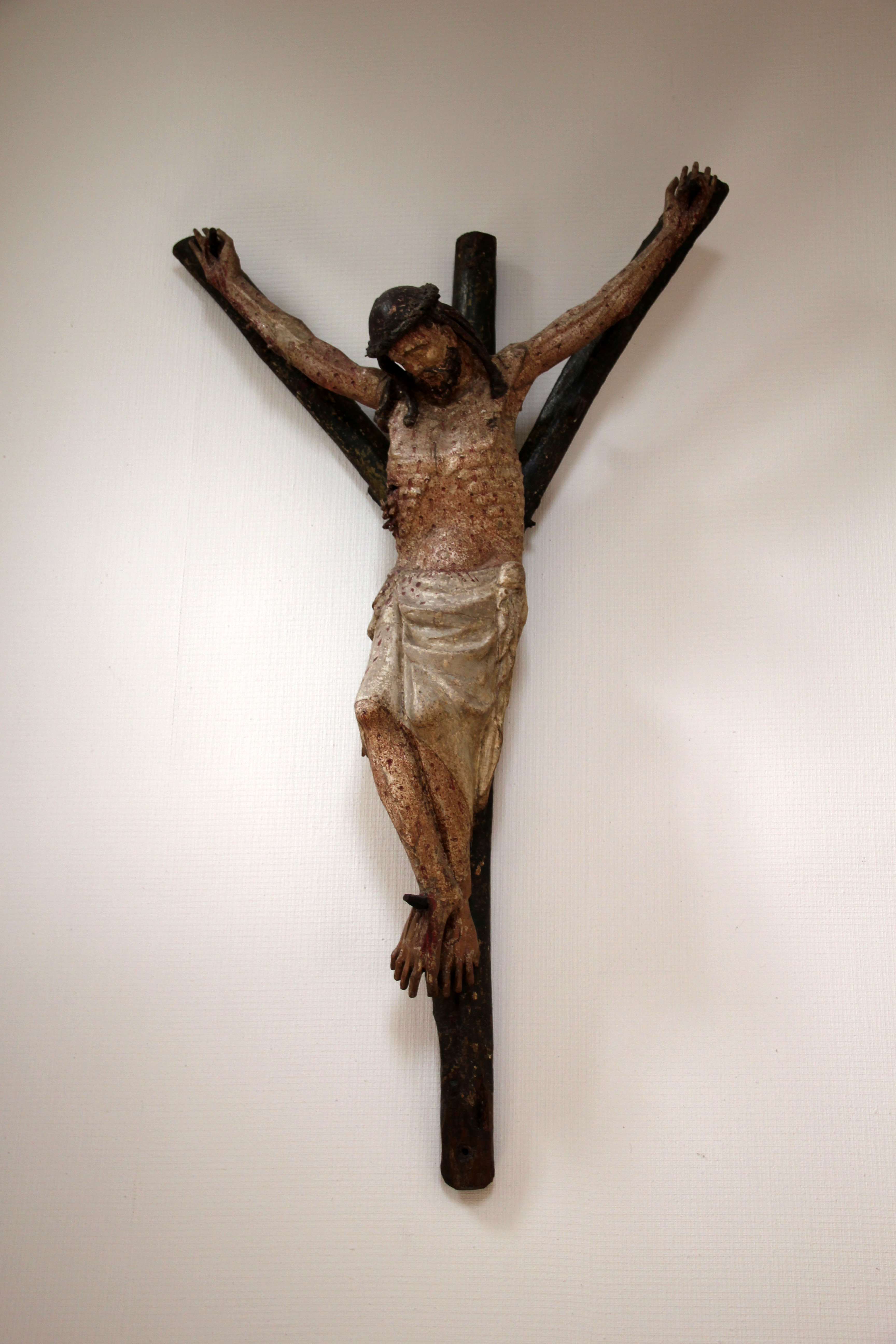 Köln Stüttgenweg, Gabelkreuz des Stüttgenhofes im Herrenhaus